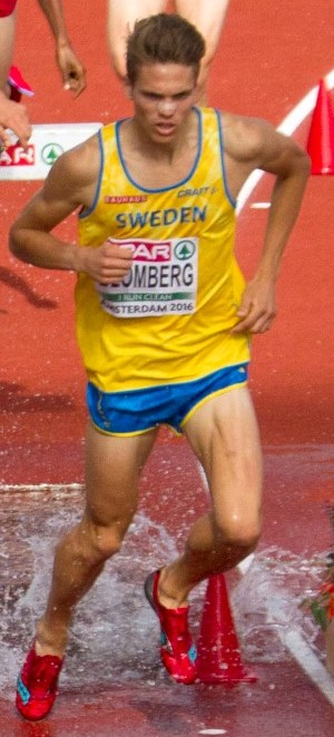 0184 steeple reeksen mekhissi